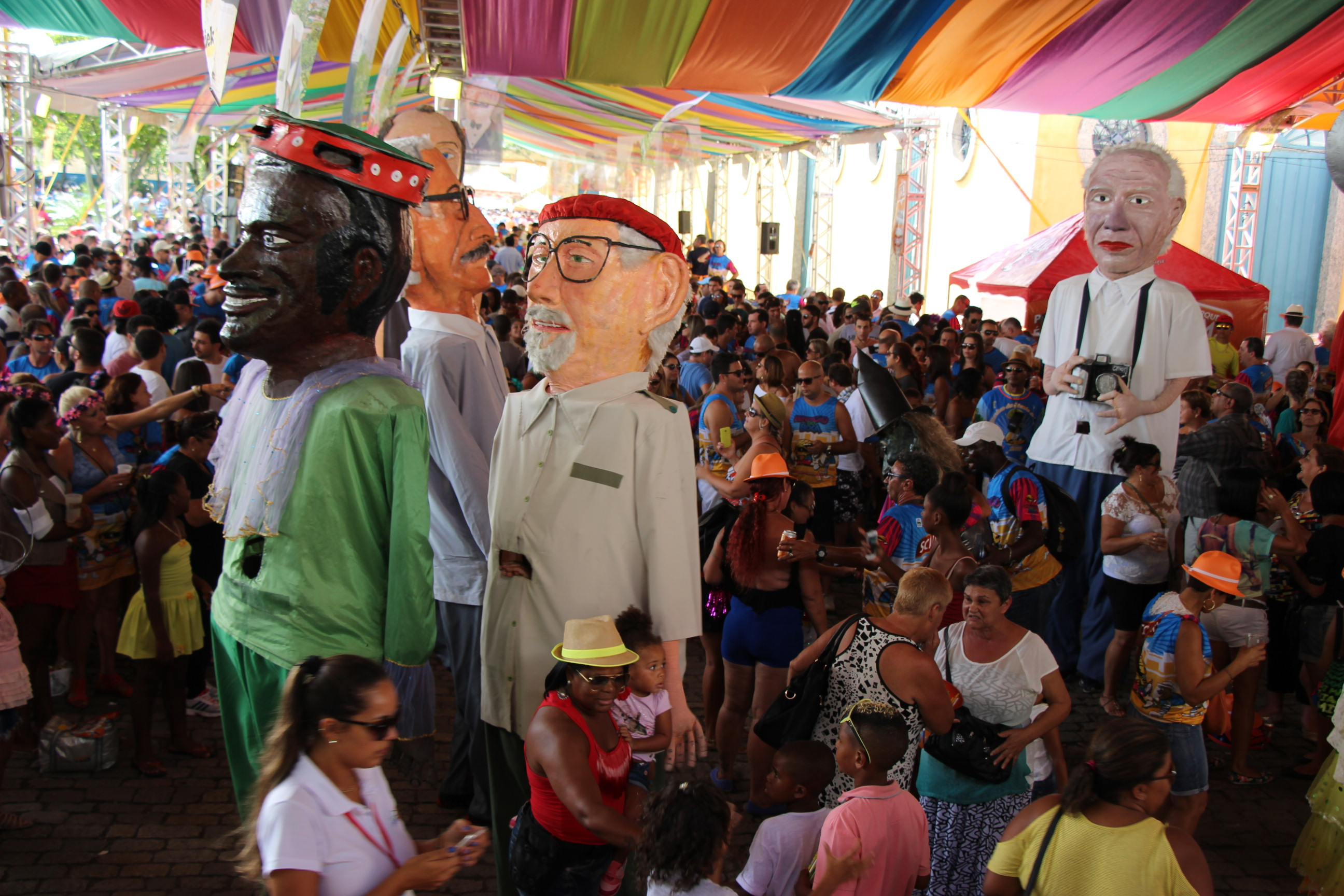 Bonecões no Pavilhão do Berbigão do Boca em 2015.